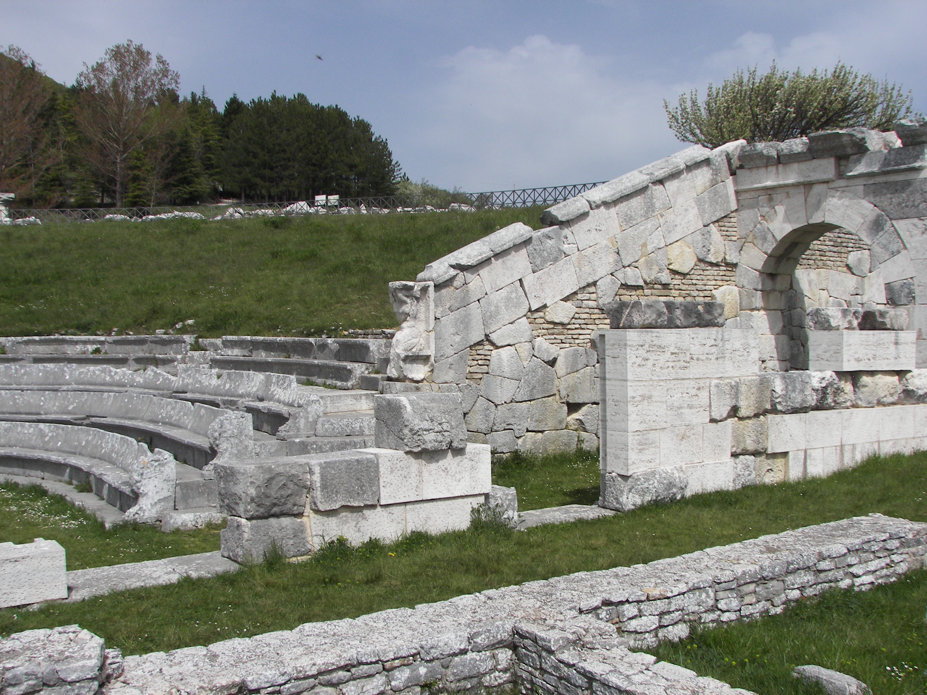 Sito archelogico sannita di Pietrabondante (IS)